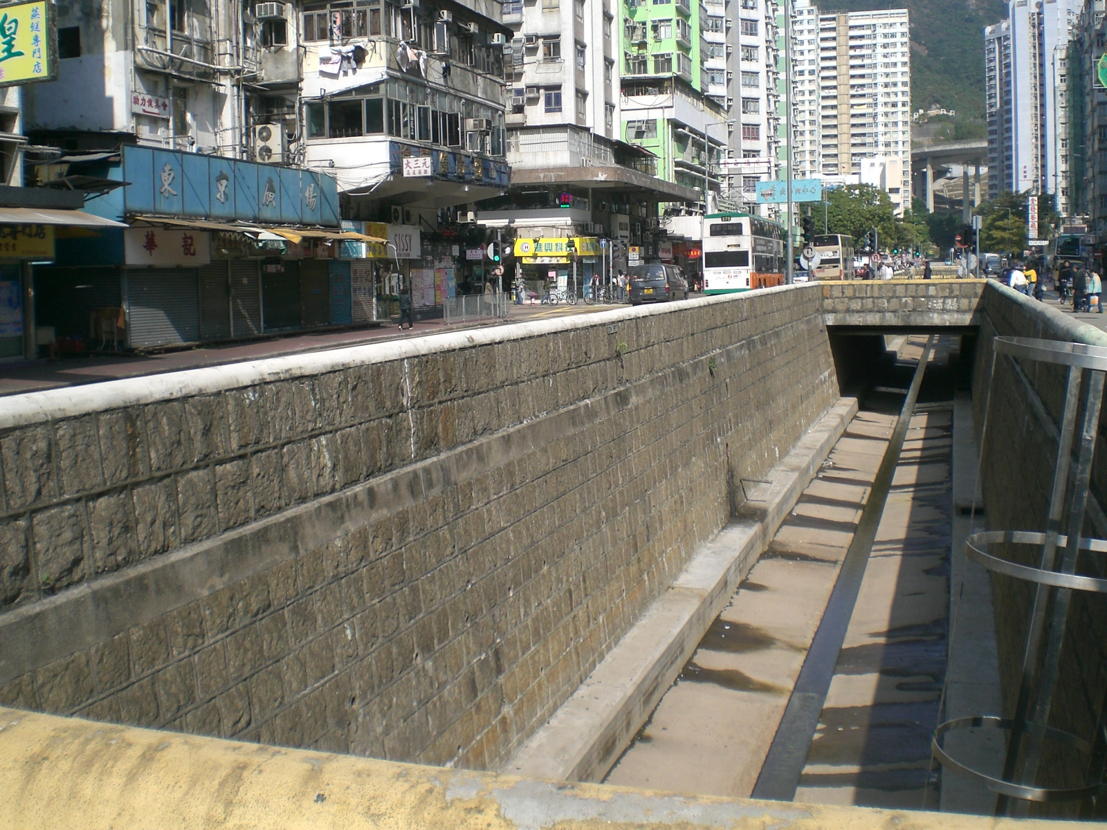 長沙灣東京街及東京街渠